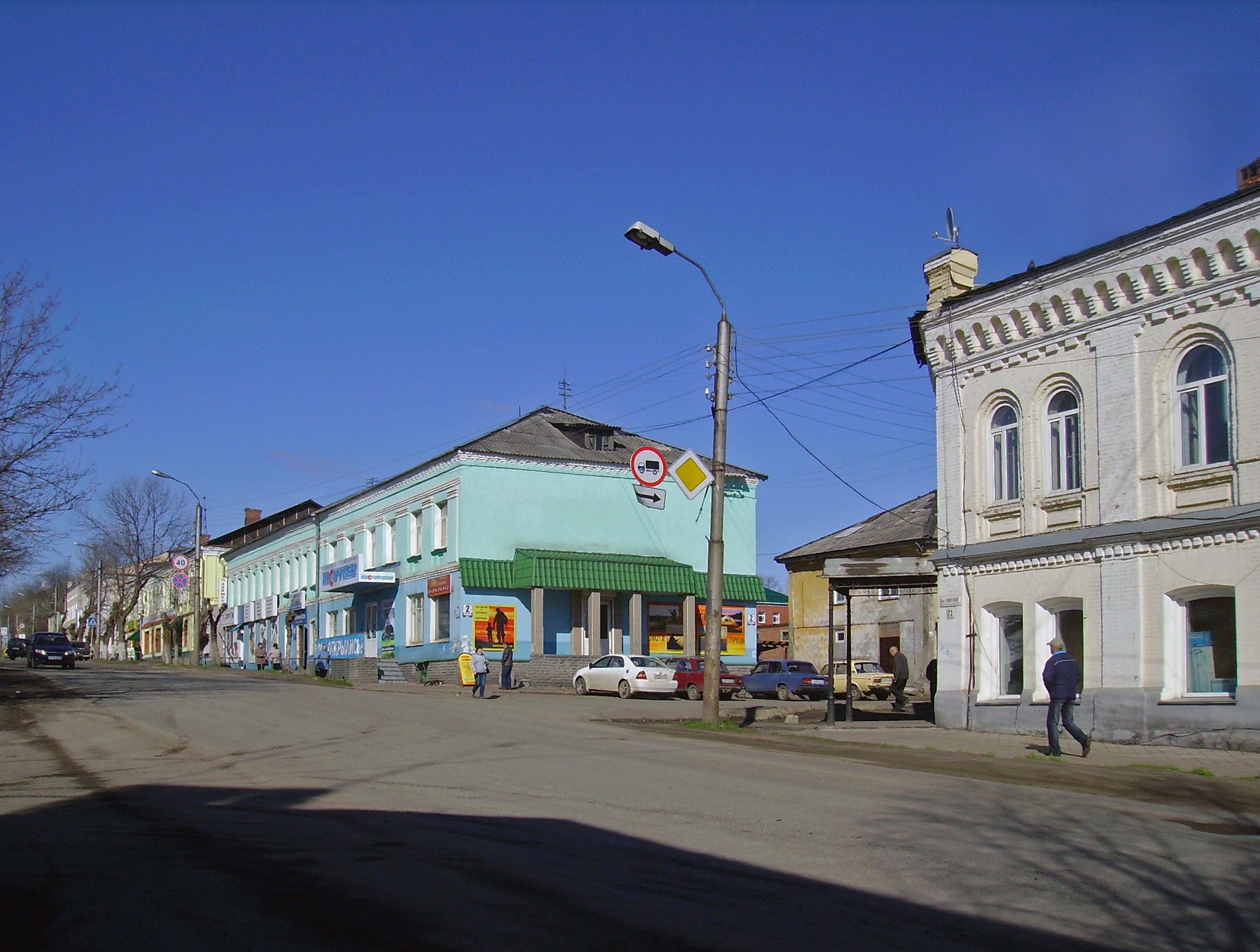 Котельнич. Перекресток улиц Советской и Ленина